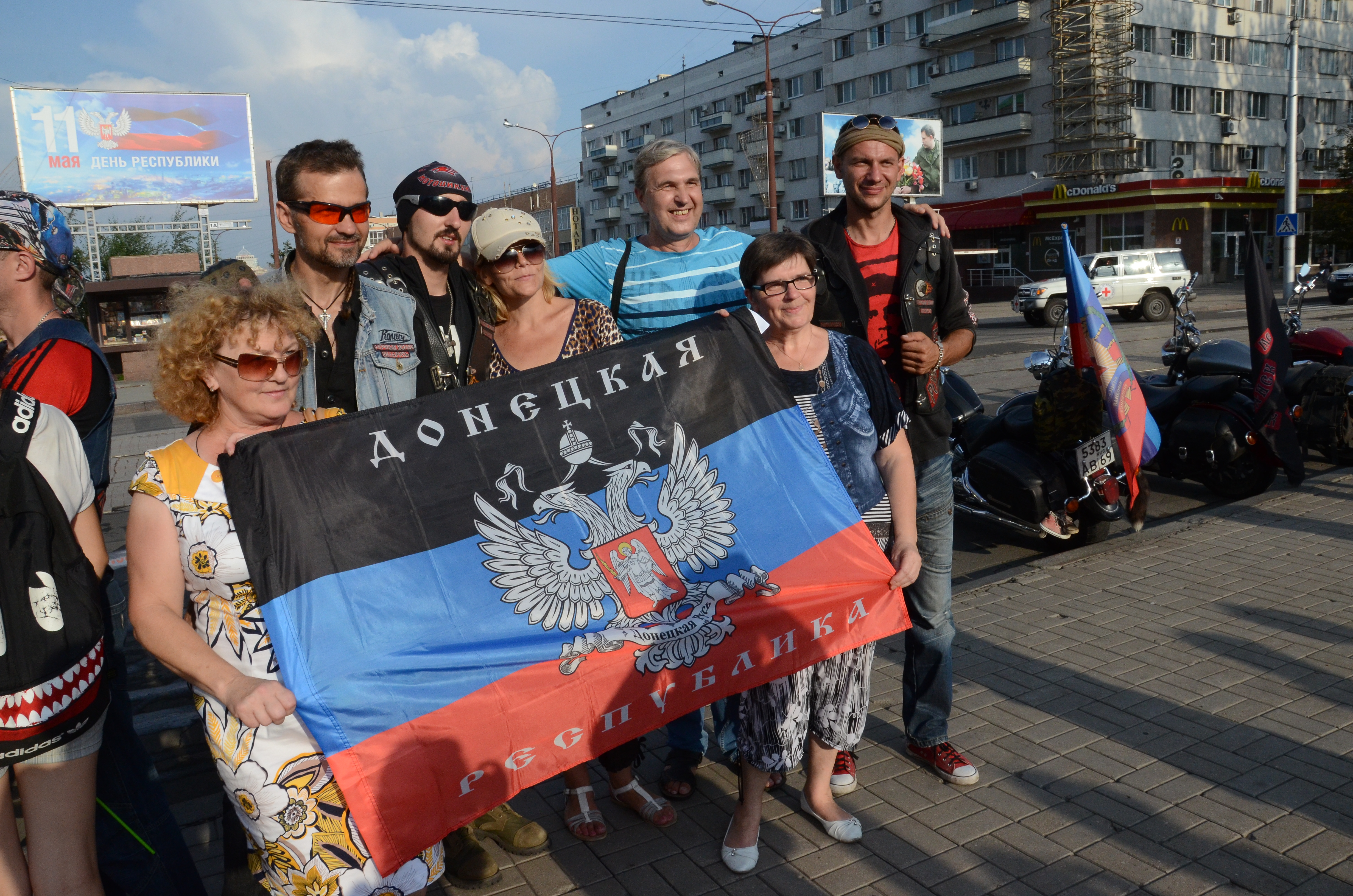 Фестиваль «Большой Донбасс»